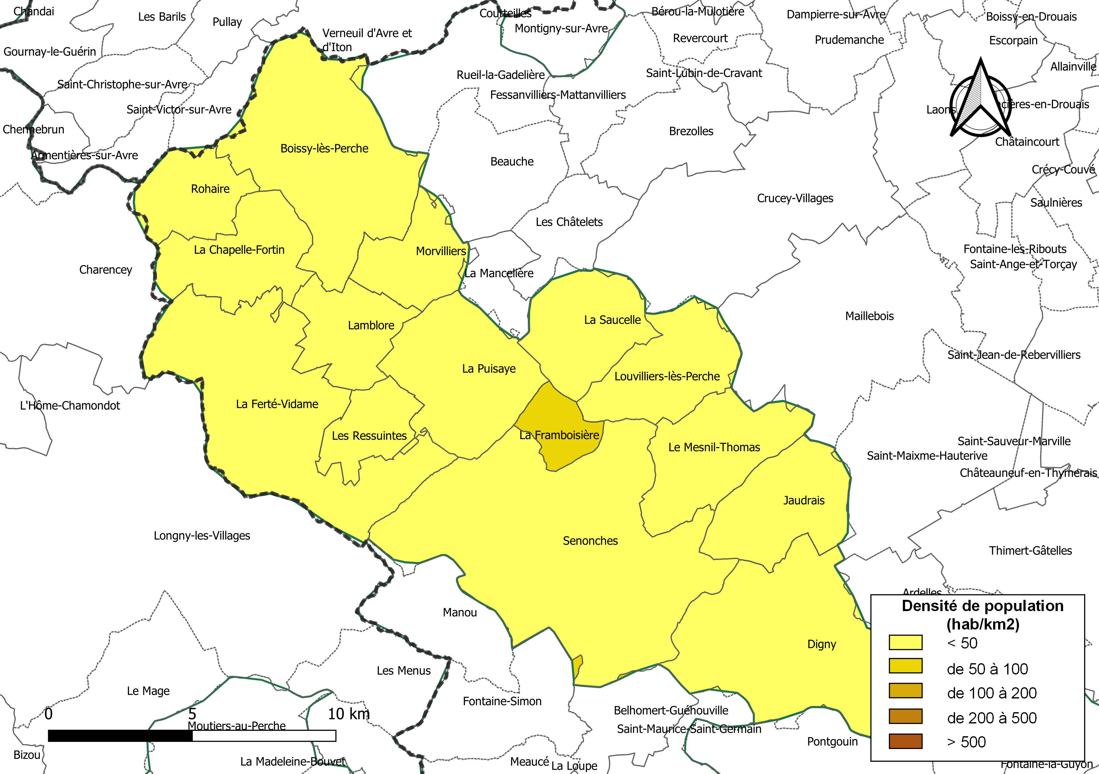 Carte des densités de population (millésimée 2016) des communes de la communauté de communes la Communauté de communes des Forêts du Perche, département d'Eure-et-Loir, France. Composition au 1er janvier 2019.